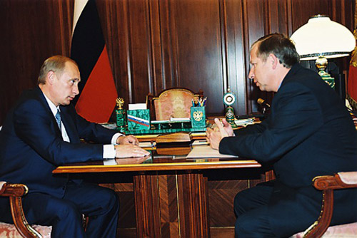 МОСКВА, КРЕМЛЬ. С полномочным представителем Президента в Северо-Западном федеральном округе Виктором Черкесовым.